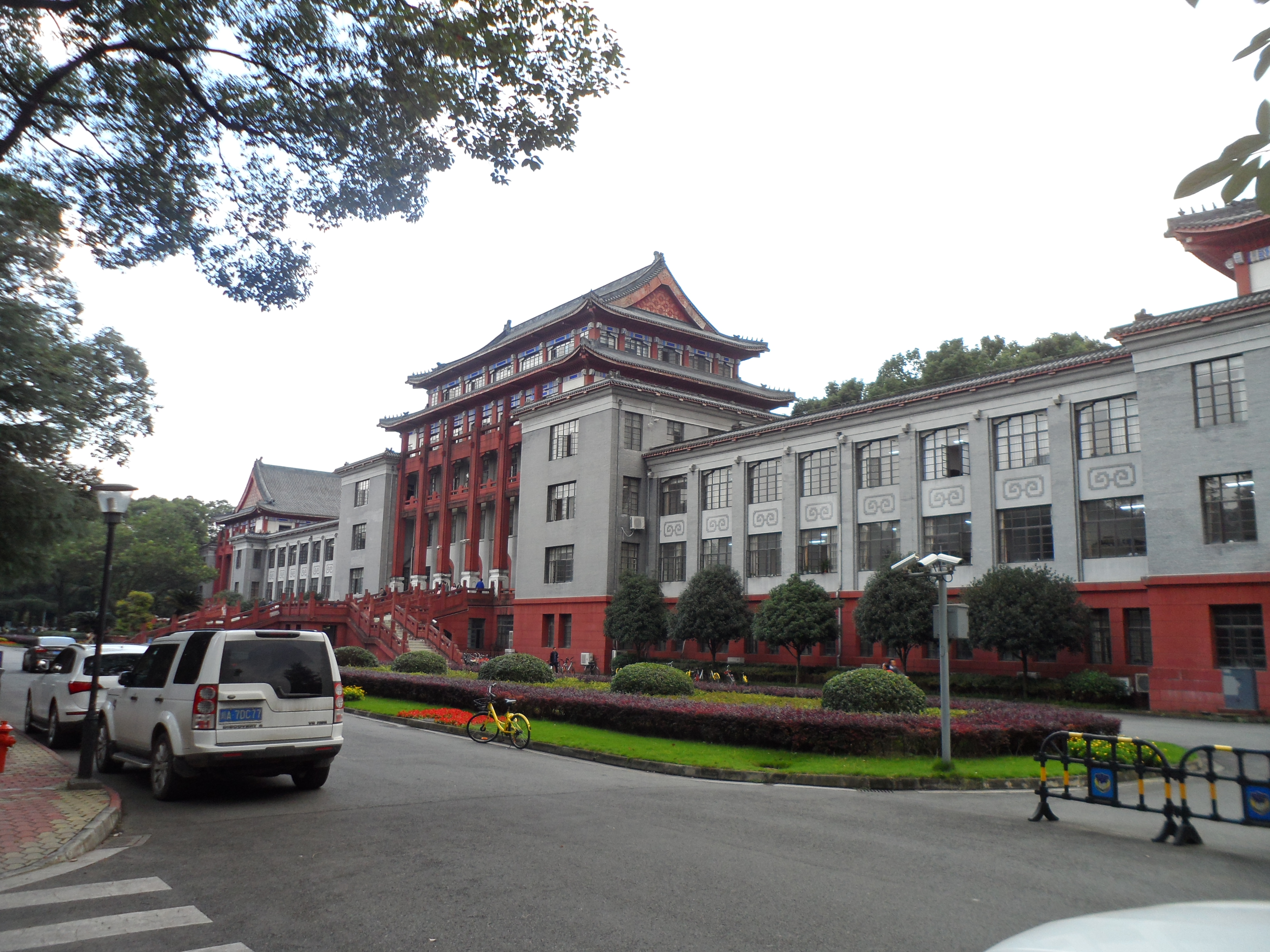 四川大学西行政楼